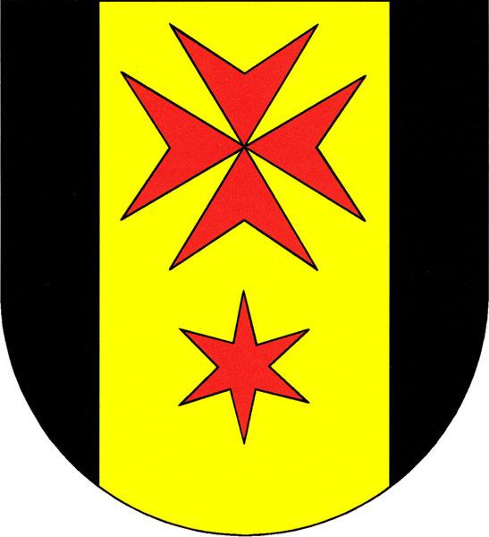 Znak obce Plchov